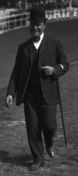 Dranem